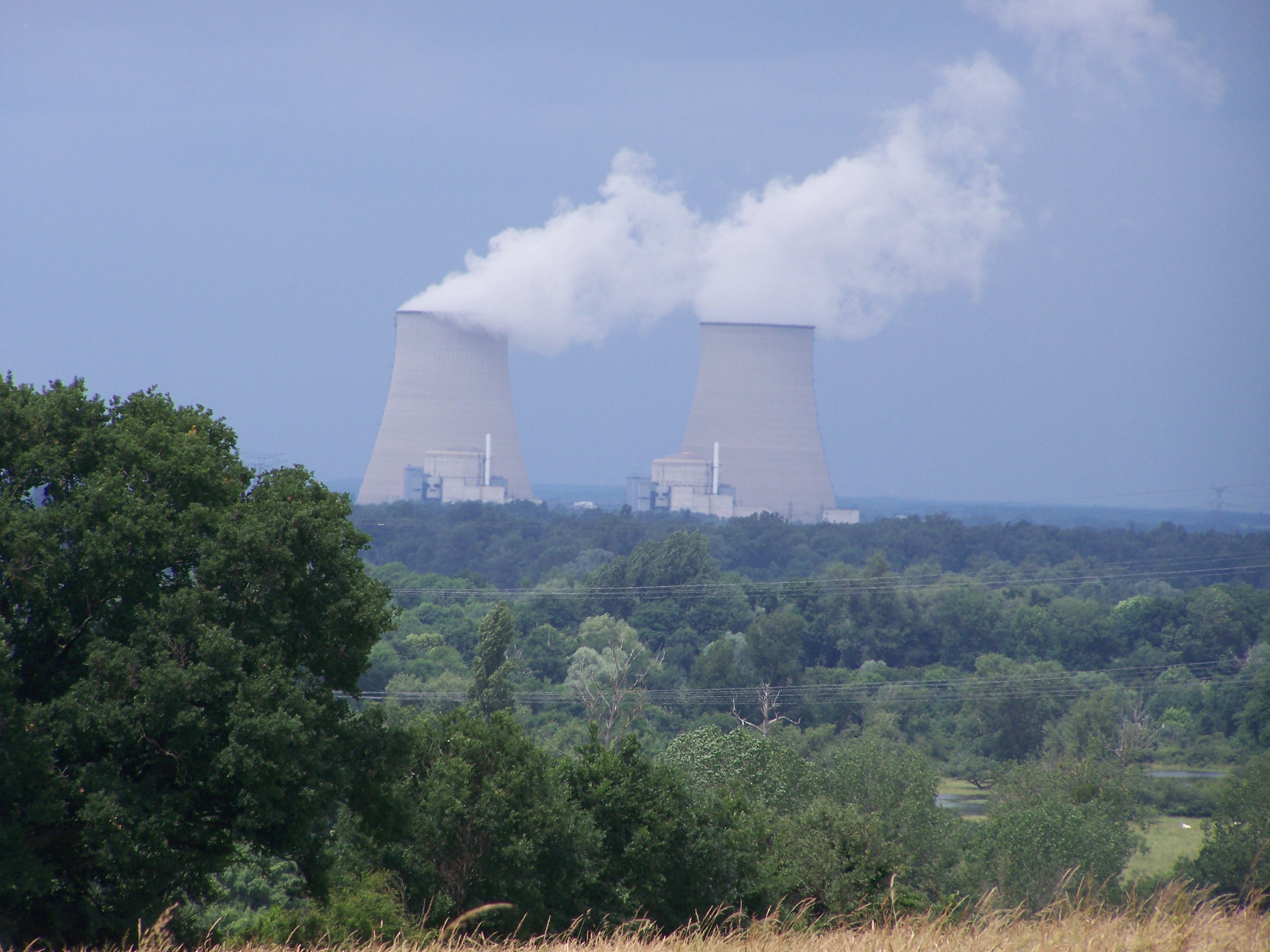 Vue sur la centrale nuclaire de Belleville-sur-Loire (18), depuis Myennes (58)